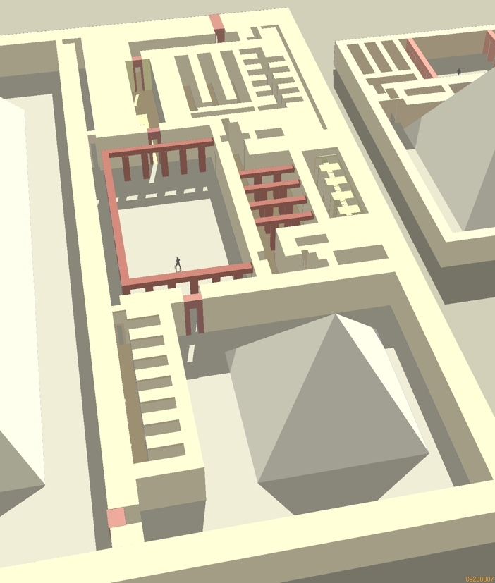 Le temple funéraire d'Ouserkaf à Saqqarah - Ve dynastie égyptienne